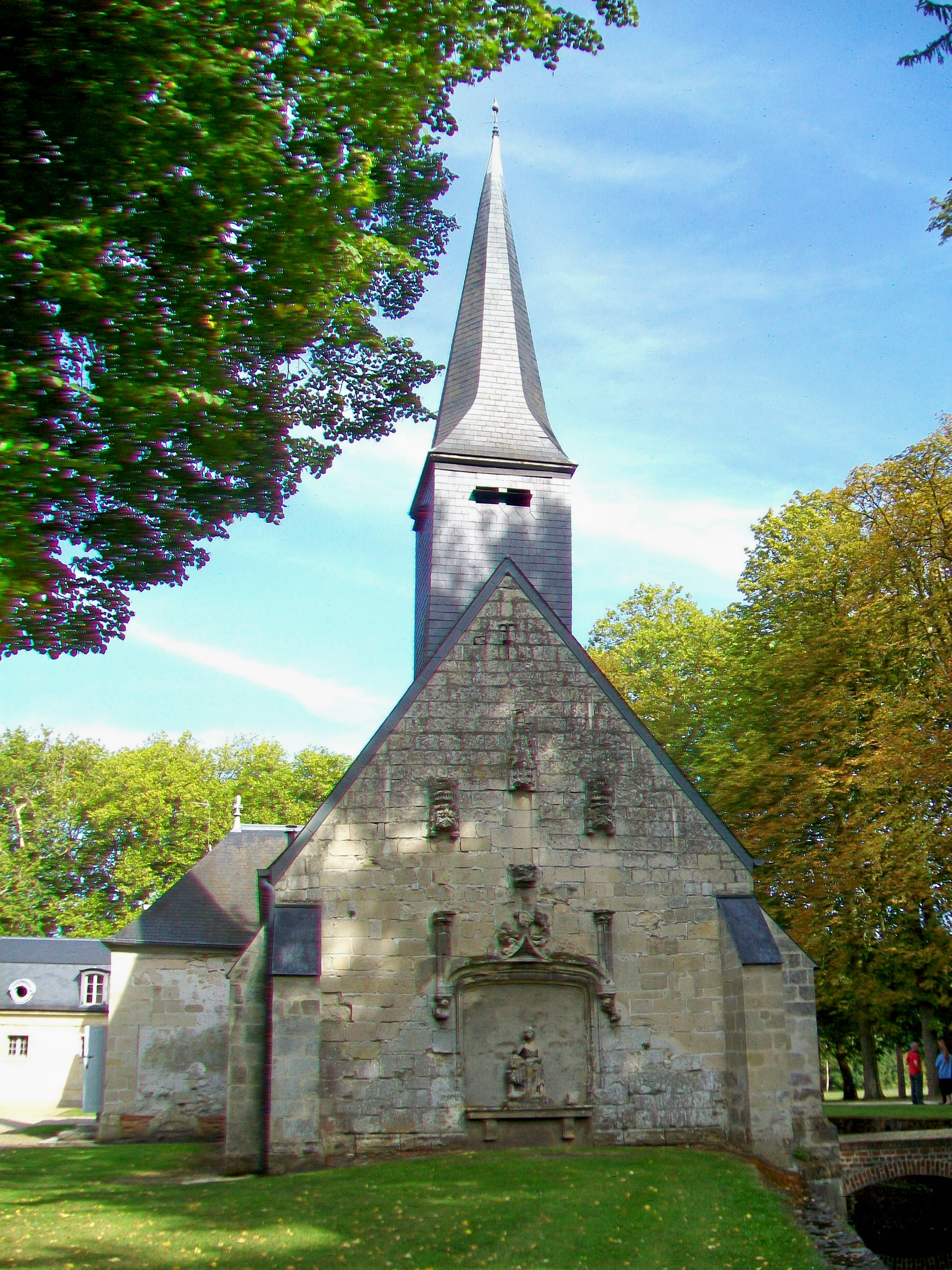 La façade ouest.